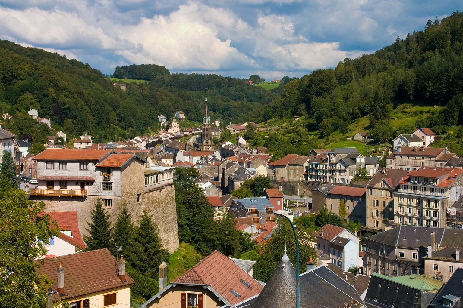 Vue sur Plombières les Bains depuis l'Ouest (prise depuis la route d'Epinal).